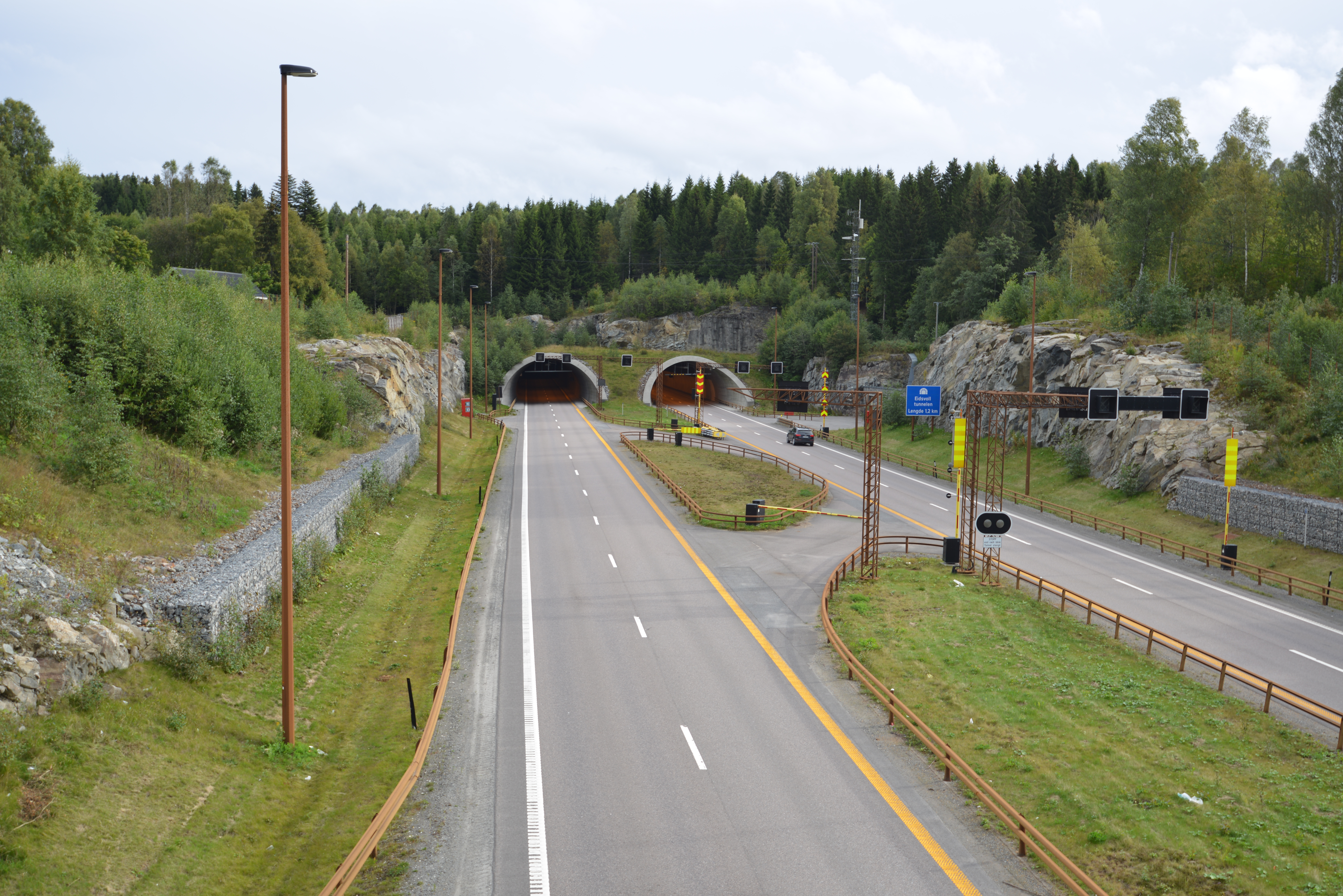 Eidsvolltunnelen på E6